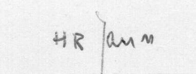 Unterschrift von Hans Robert Jauss, 1972, unter einer Briefkarte an den Freiburger Pathologen Walter Sandritter (1920-1980).